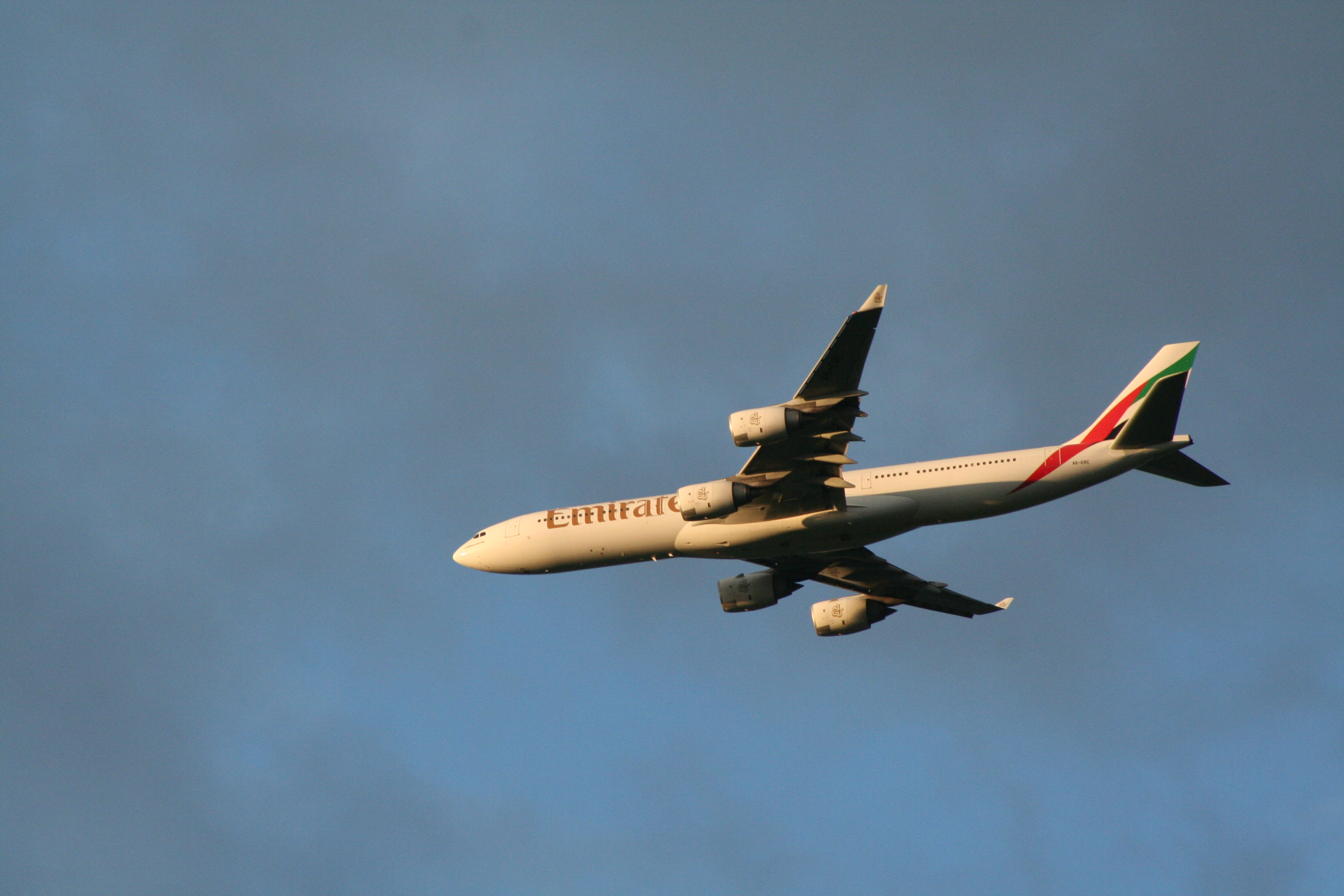 Airbus der Emirates im Südanflug auf Zürich